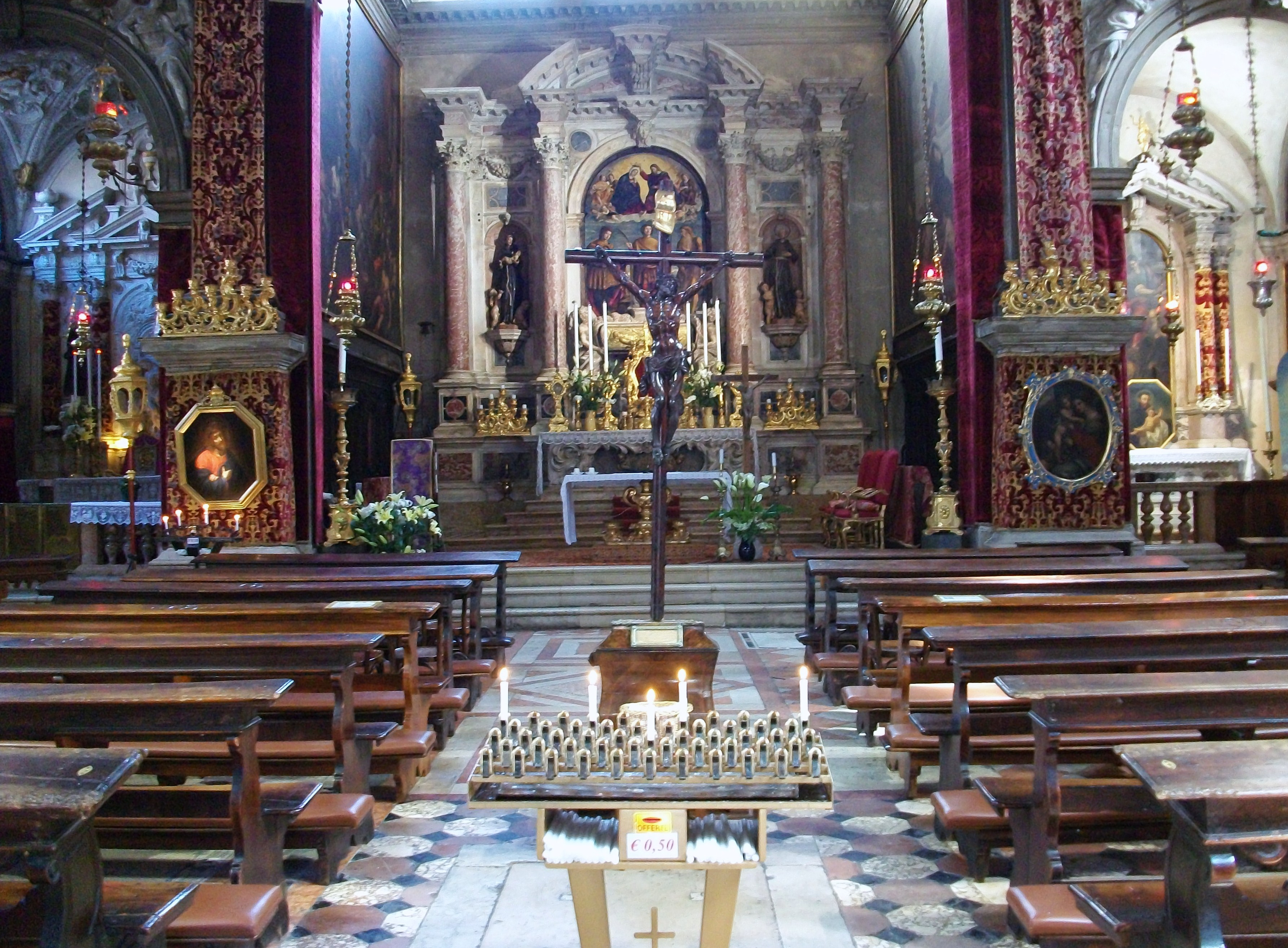 Interior de l'església de San Zulian, Venècia.